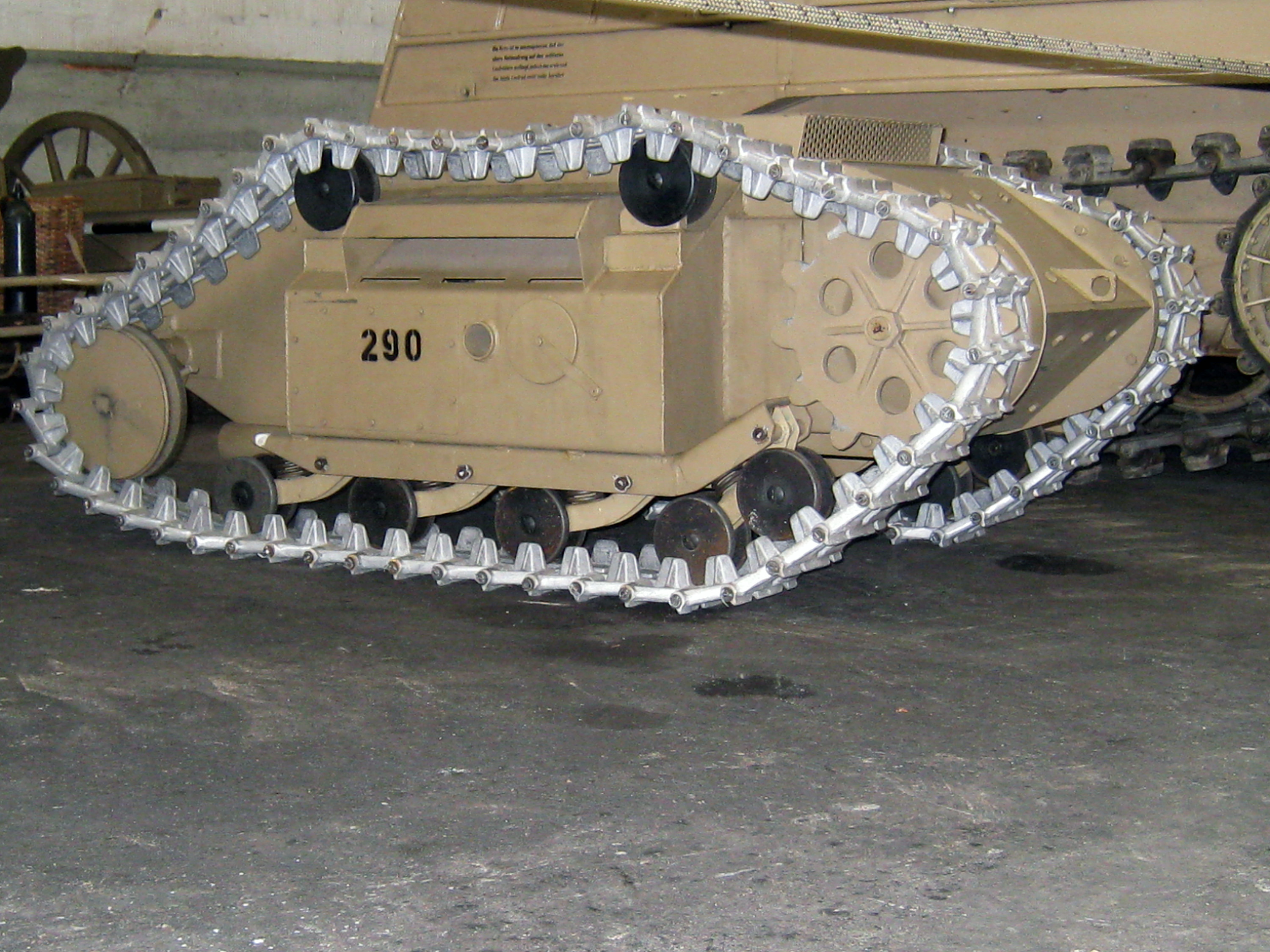 ferngesteuerter Ladungsträger Goliath der deutschen Wehrmacht